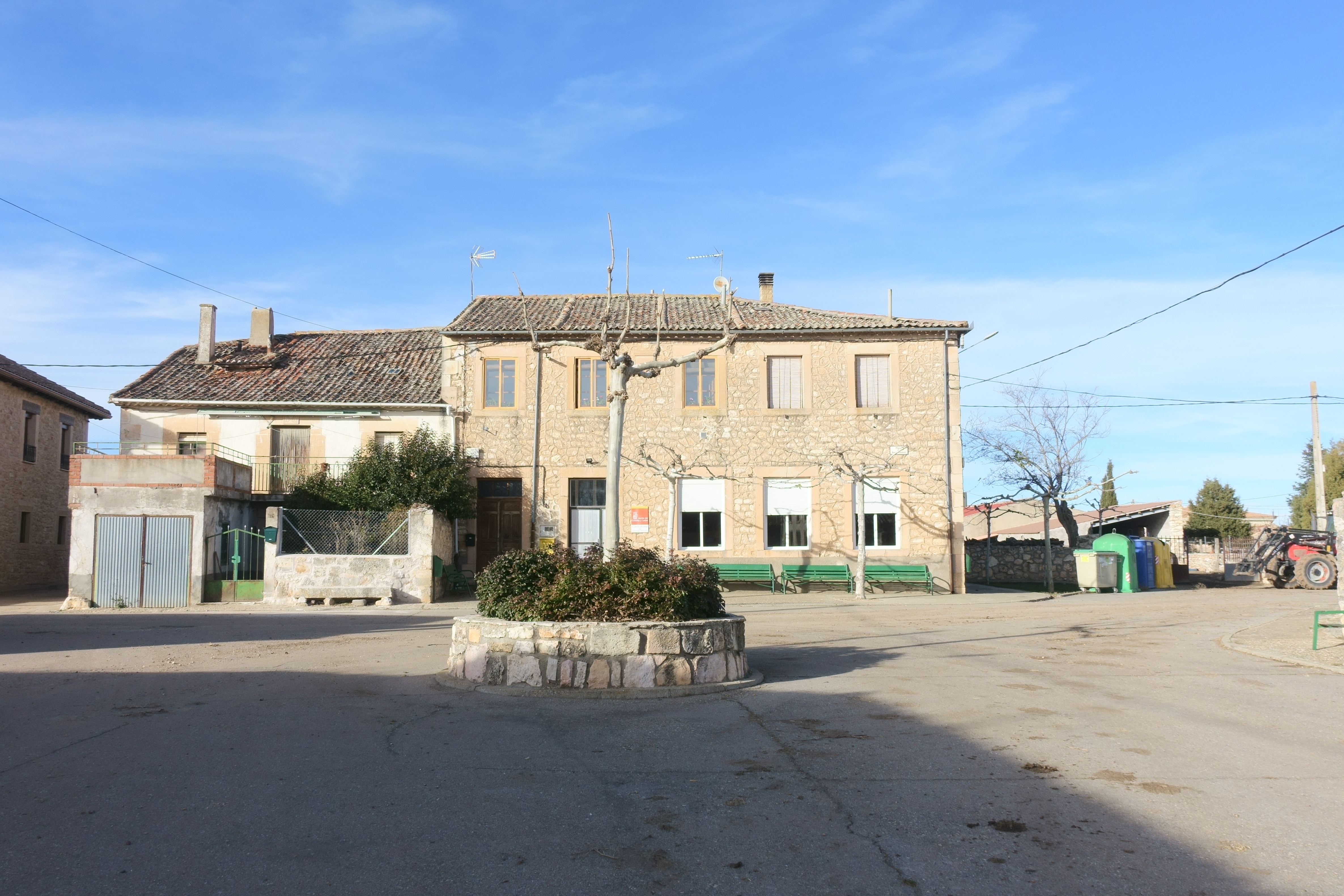 Plaza de San Mamés, en Cilleruelo de San Mamés (Segovia, España).